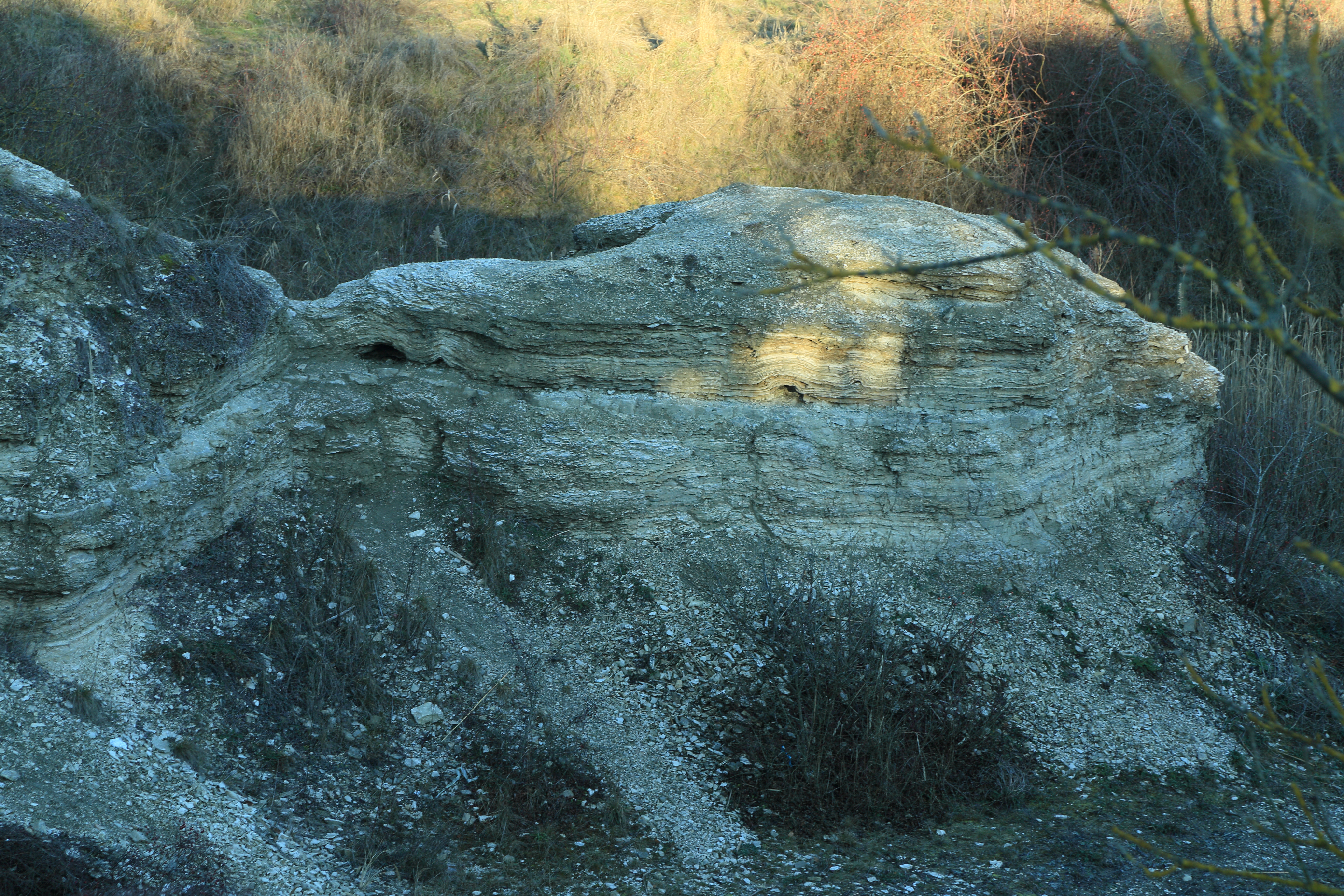 Ehem. Gipsbruch in Bad Windsheim Ost Geotop-Nummer: 575A026